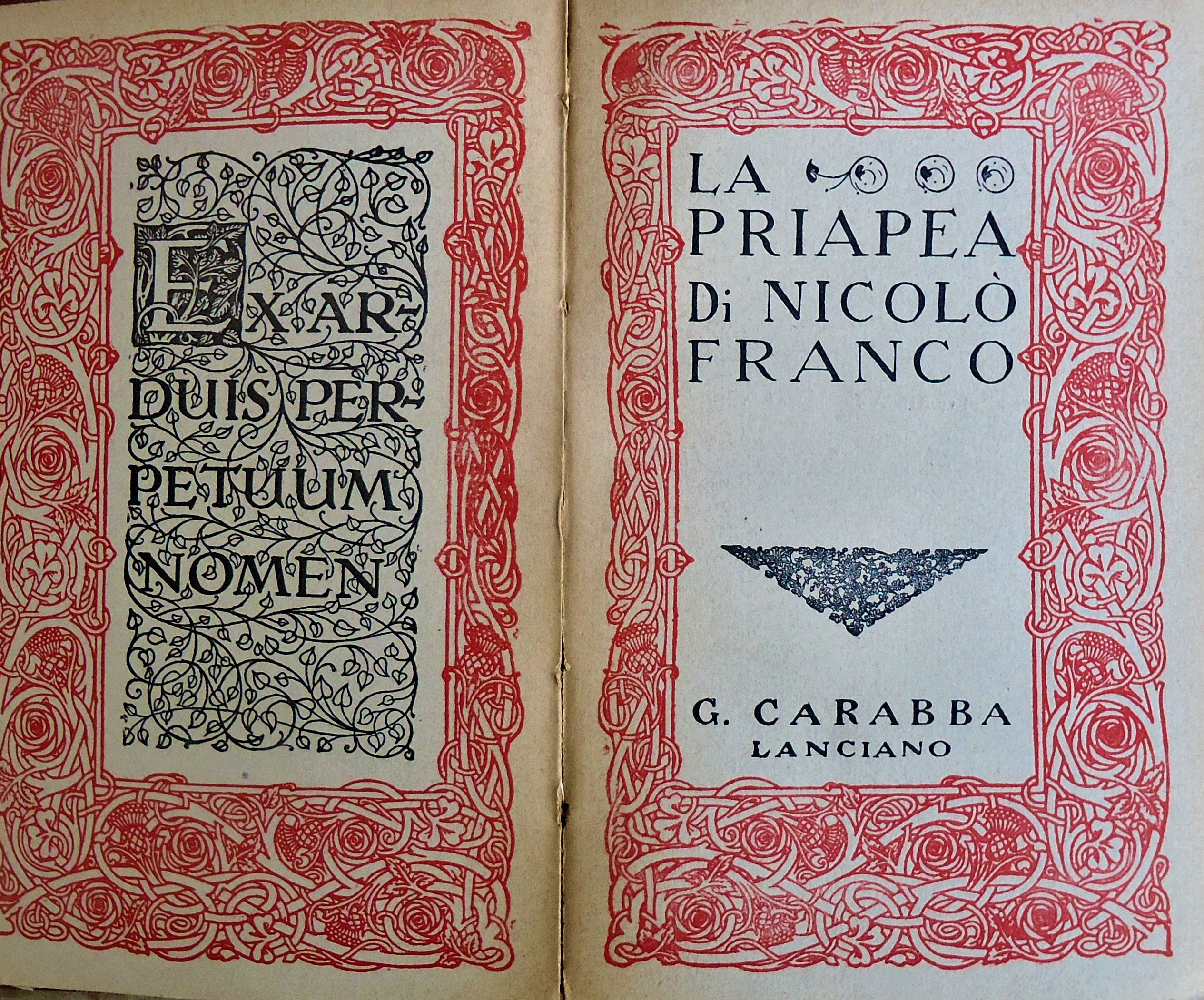 Collana Scrittori italiani e stranieri.